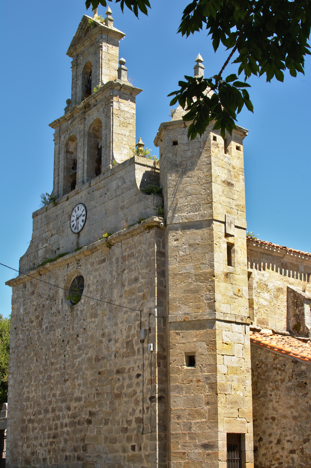 Iglesia de San Román en el municipio de Orzales, Campoo de Yuso, Cantabria, España.